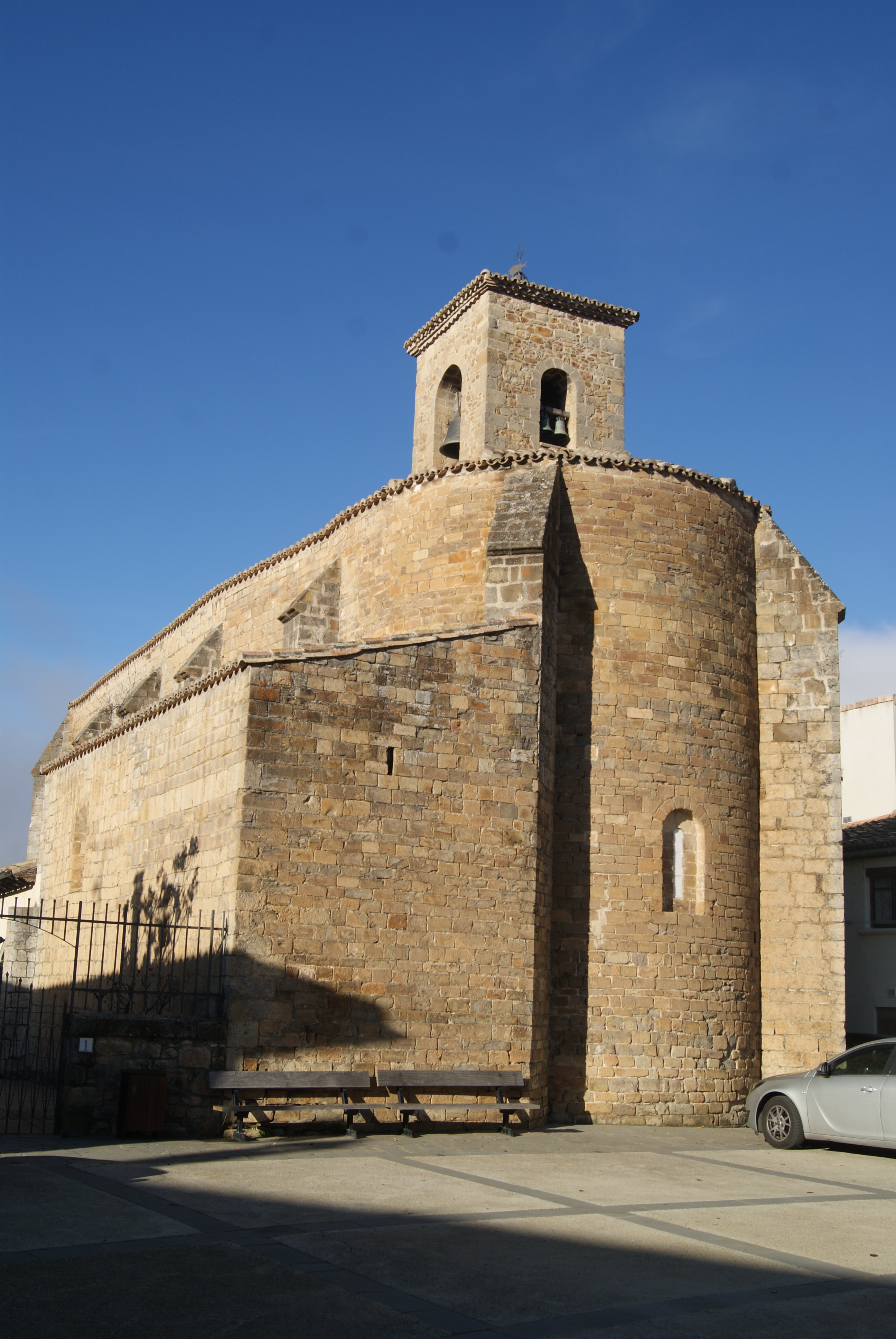 Sigüés (iglesia de San Esteban)